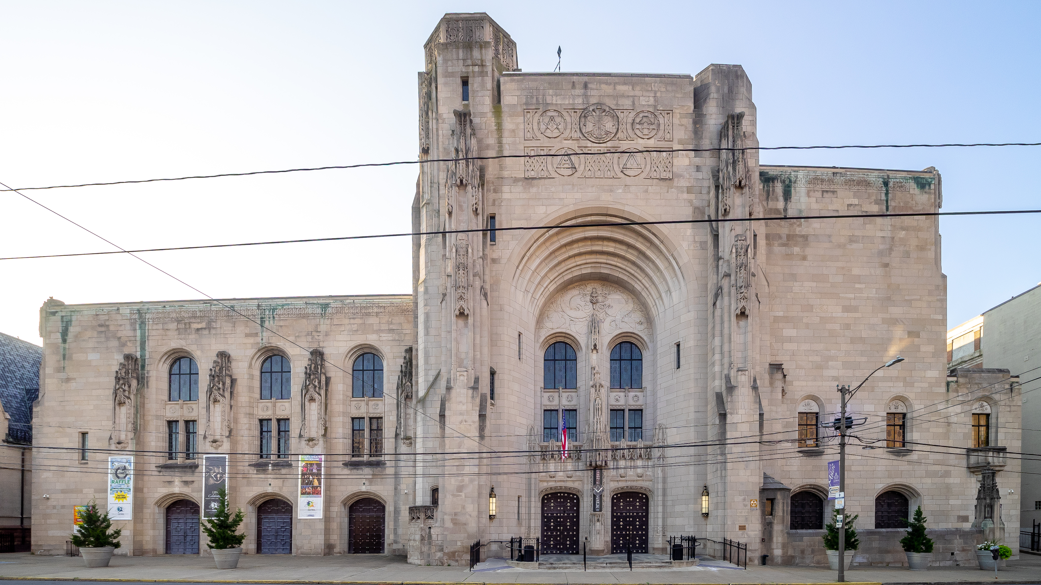 Scranton, PA